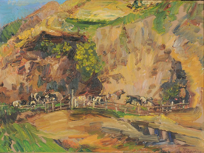 Recinto con mucche, olio su tavola, cm 25 x 36, firmato, coll. privata